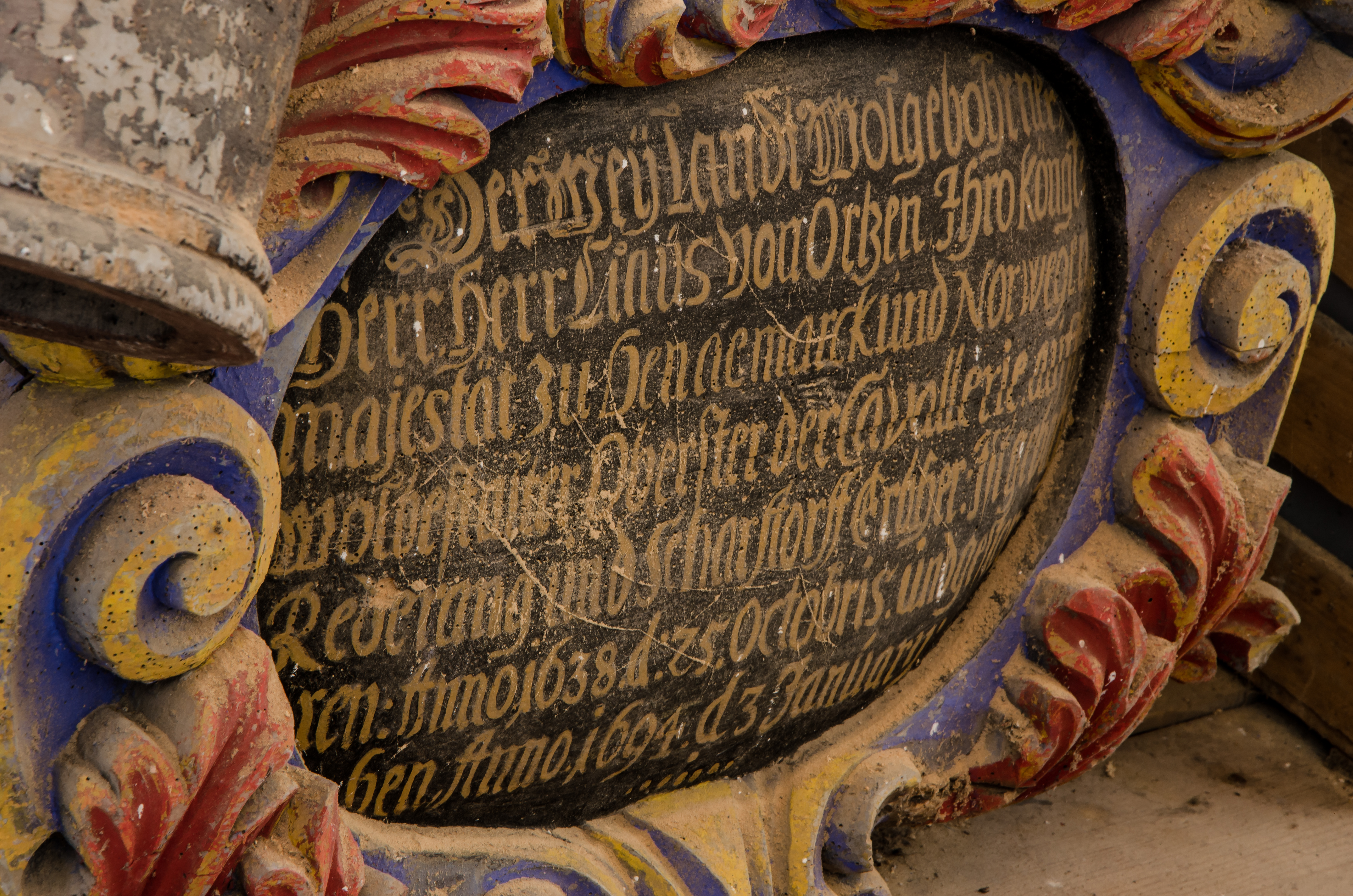 Kavelstorf Kirche Tafel zum Totenschild Claus von Örtzen